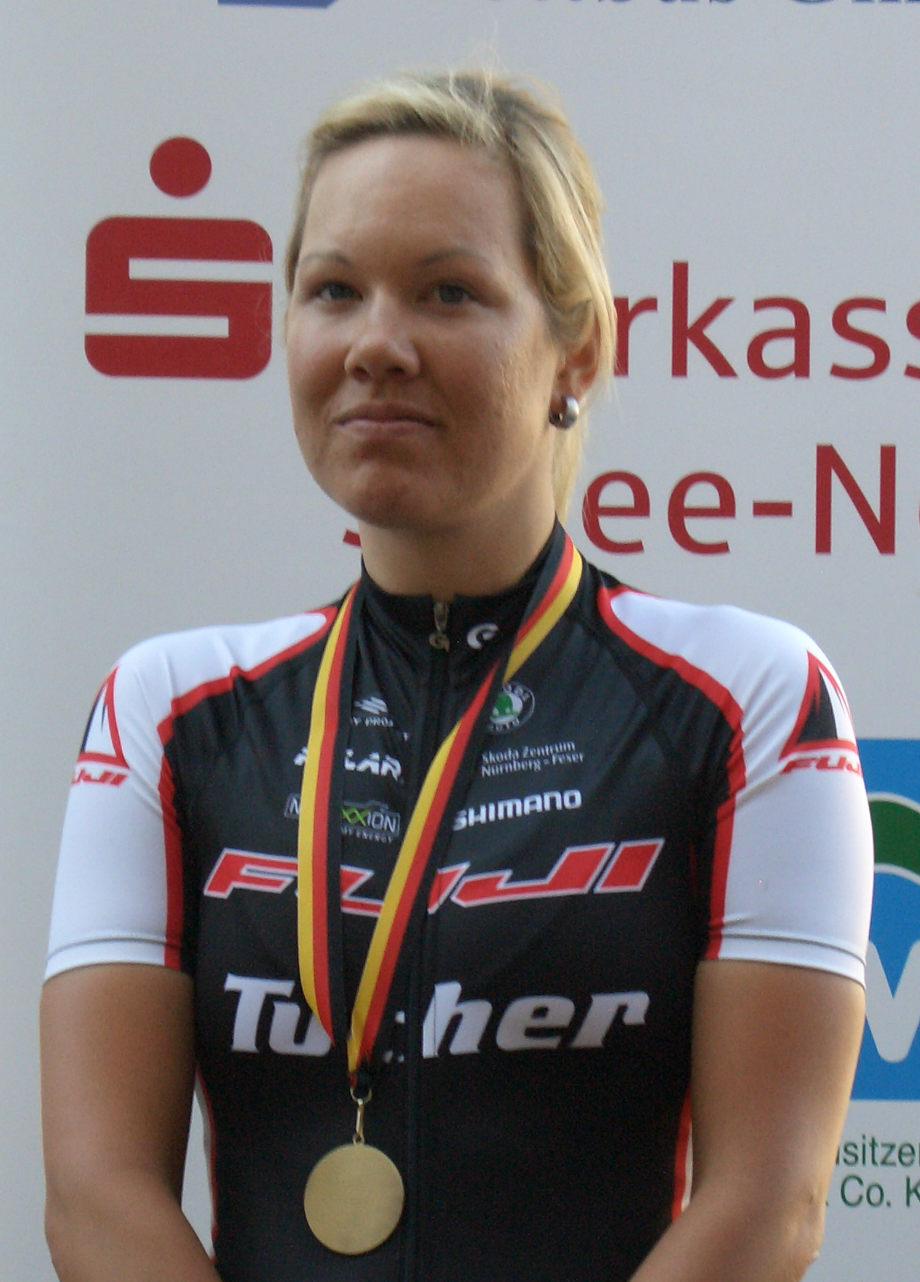 Madeleine Sandig, Radsportlerin